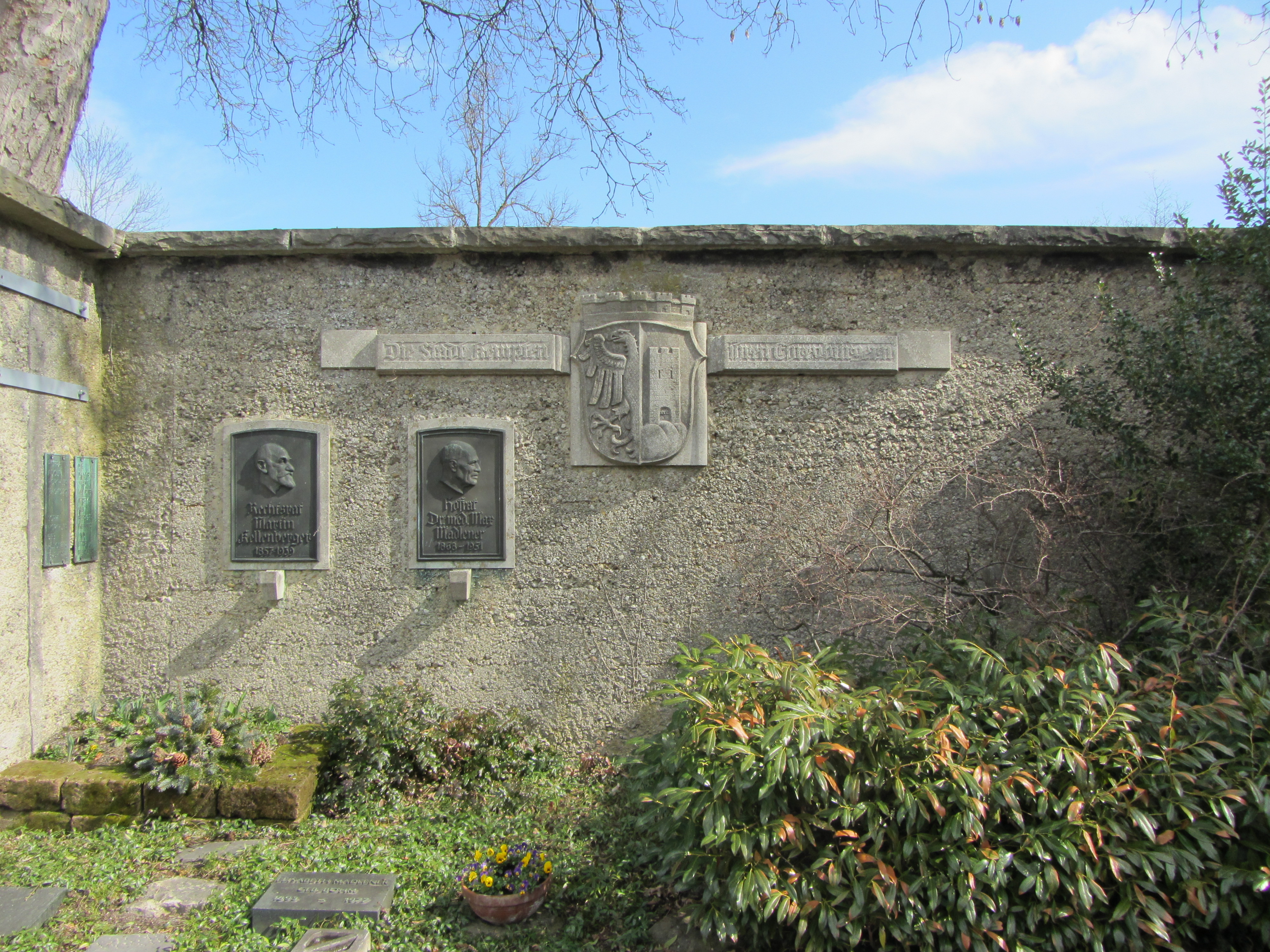 Städtischer Zentralfriedhof (Kempten) - Ehrenmal Ehrenbürger